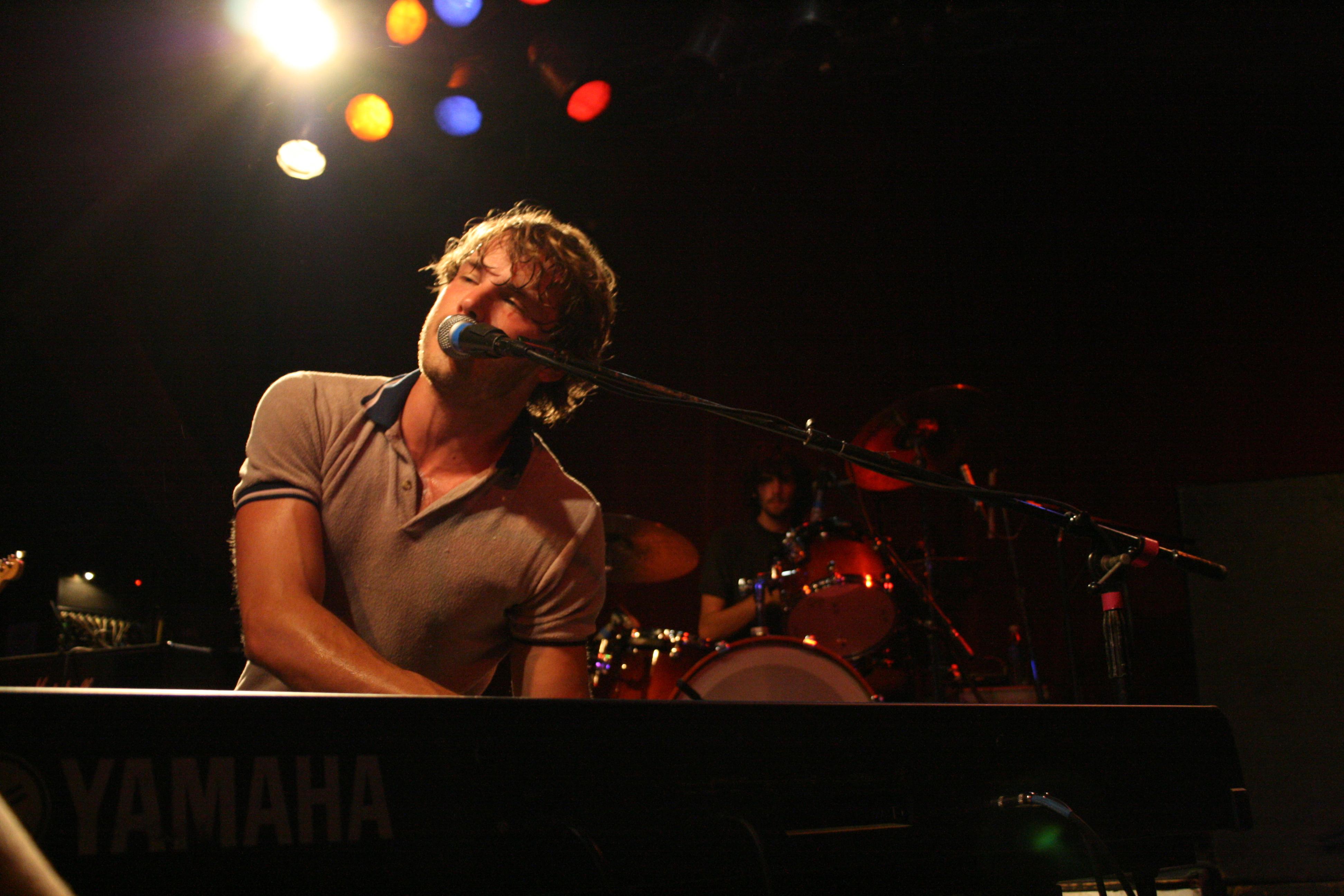 Cantor Jon McLaughlin em apresentação na cidade de Nashville, no Kansas.